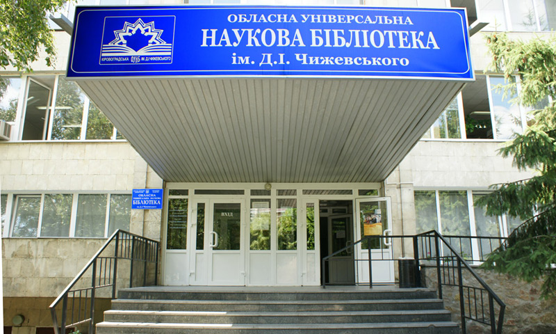 Основна будівля Обласної універсальної наукової бібліотеки ім. Д. І.Чижевського;Кіровоград.